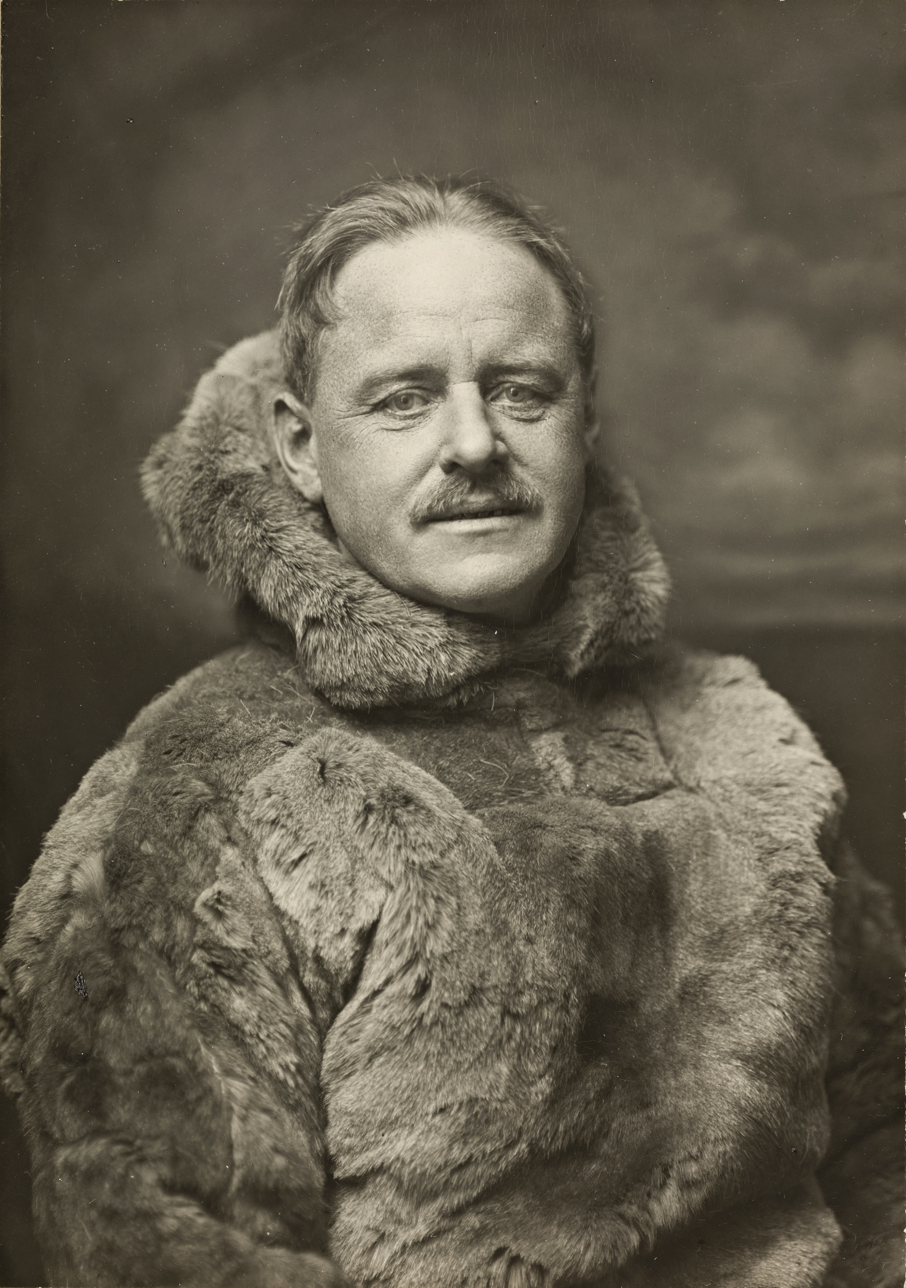 Beskrivelse / Description: Godfred Hansen var dansk marineoffiser og polarfarer. Han var også nestkommanderende på Roald Amundsens "Gjøa"-ekspedisjon 1903–06, hvor han også fungerte som navigatør, astronom, geolog og fotograf Dato / Date: ukjent / unknown Fotograf / Photographer: ukjent / unknown Digital kopi av original / Digital copy of original: s/h papirpositiv Eier / Owner Institution: Nasjonalbiblioteket / National Library of Norway Lenke / Link: Bildesignatur / Image Number: blds_06025